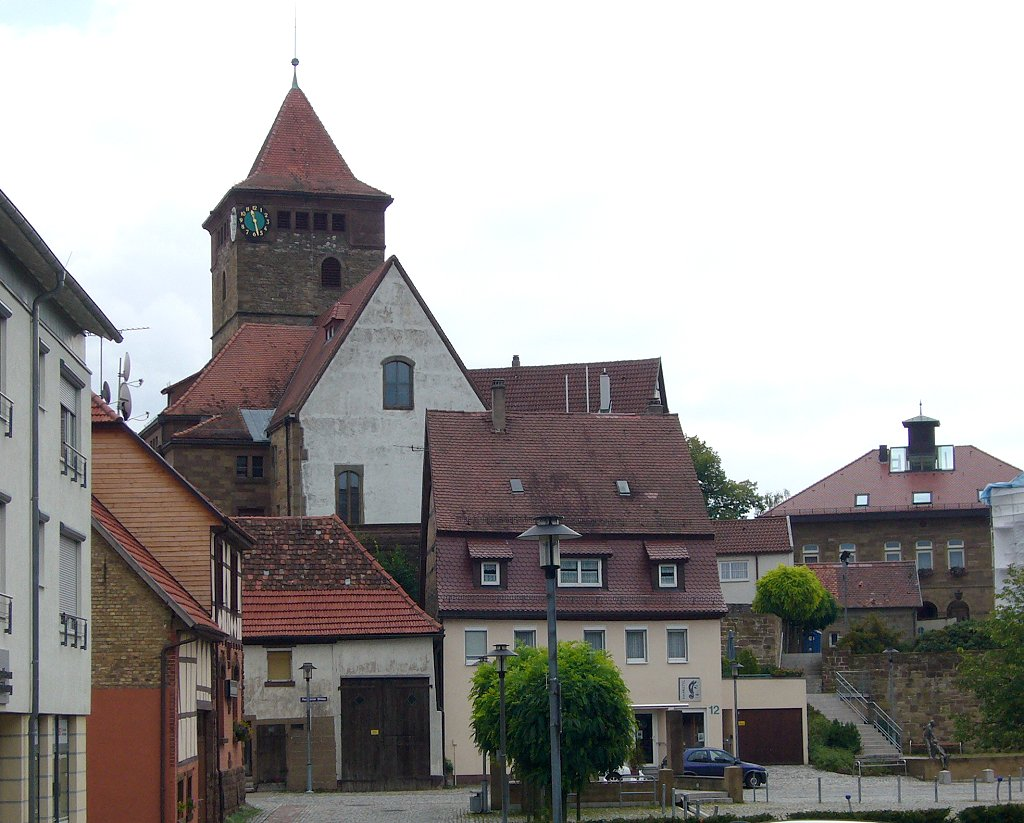 Die evangelische Michaelskirche (St. Michael) in Ötisheim